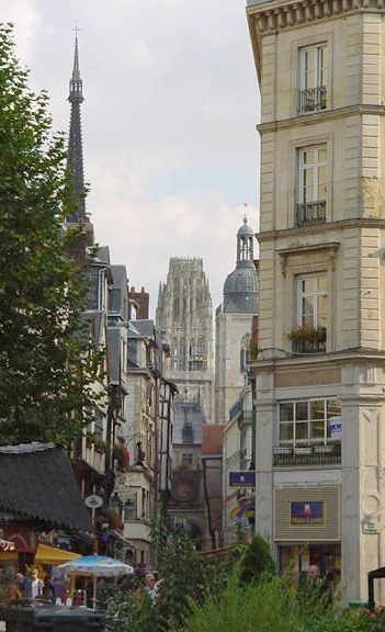 Rue de Rouen de la place du Vieux-Marché à la cathédrale